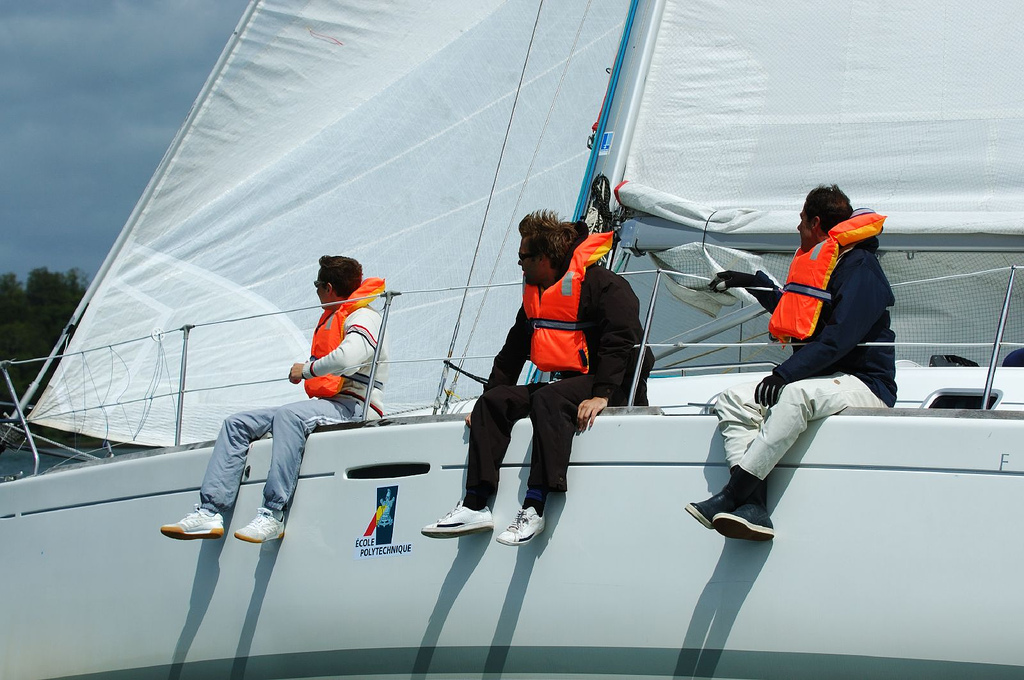 9e Trophée Voiles X-HEC (régate, Bénodet): bateau de l'Ecole Polytechnique